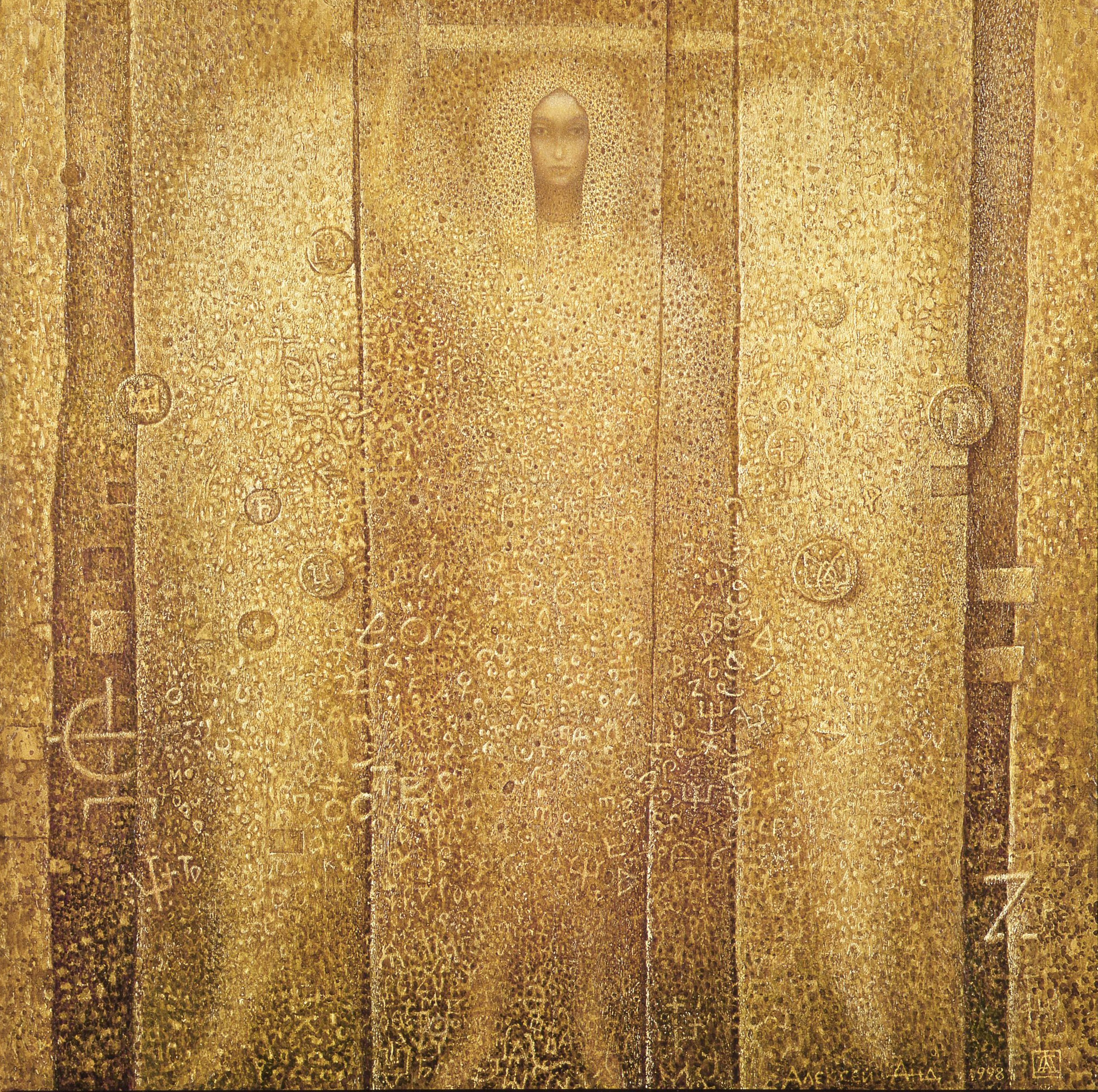 70х70, авторская техника